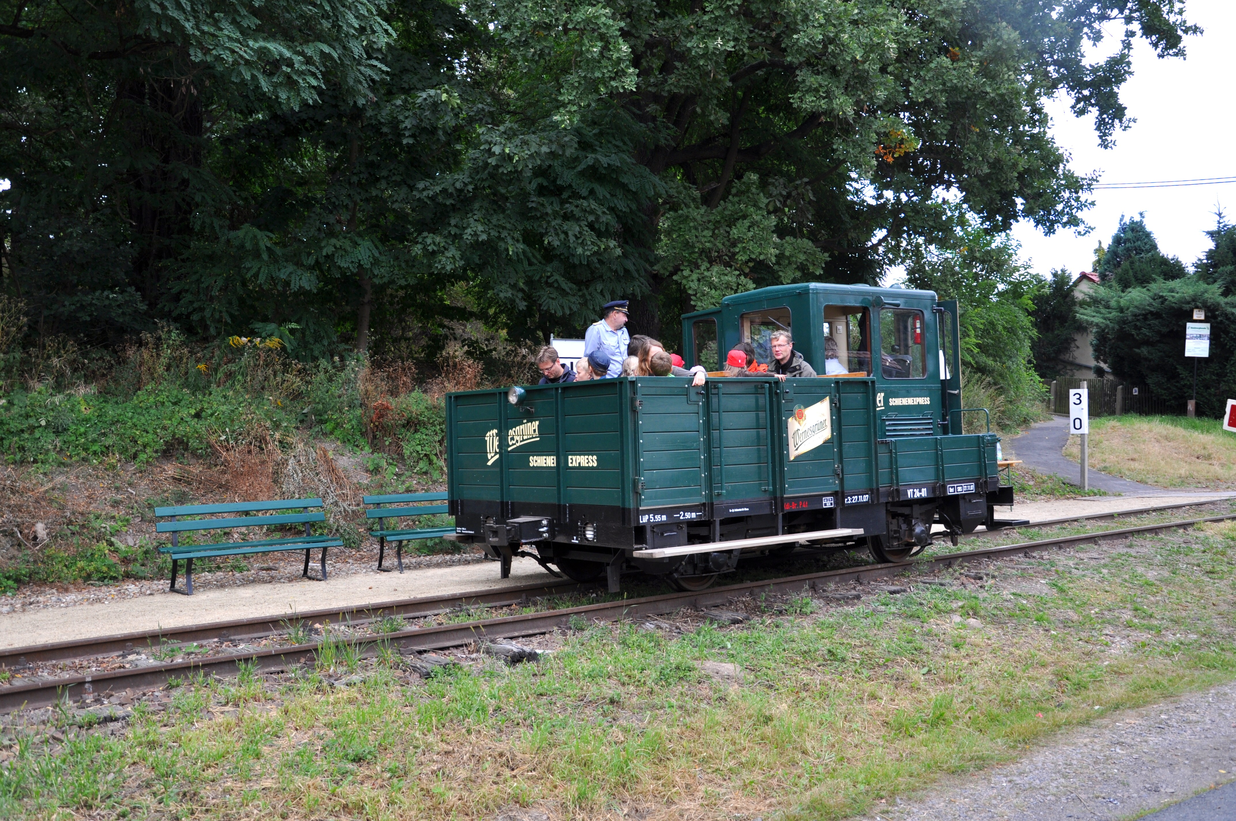 Wernesgrüner Schienenexpress am provisorischen Haltepunkt Leissnitz, Windbergbahn